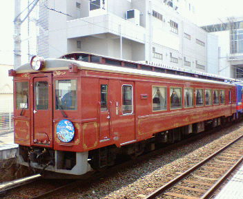 三陸鉄道：36-600形気動車：さんりくしおさい （車号：36-602） 臨時列車：さんりくしおさい八戸号運用